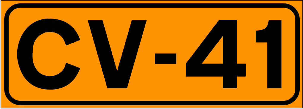 Inidcador de la Carretera de la Comunidad Valenciana CV-41